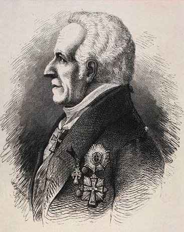 Frederik Moltke (1754–1836)